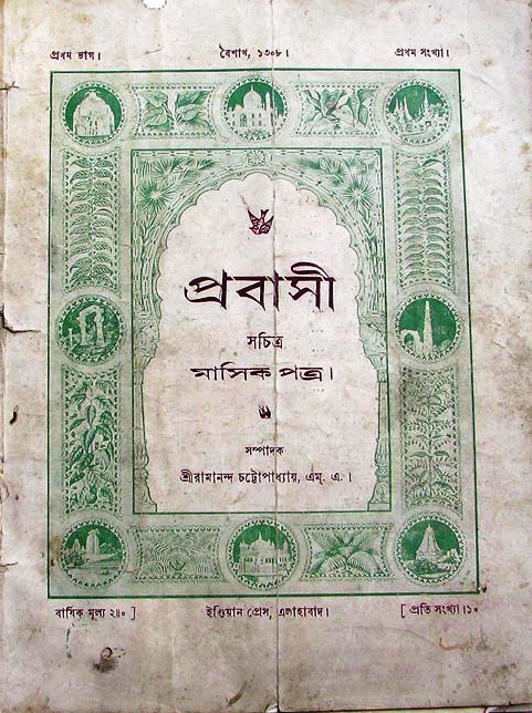 প্রবাস পত্রিকার প্রচ্ছদ। ১ম সংখ্যা, ১৩০৮ বঙ্গাব্দ।